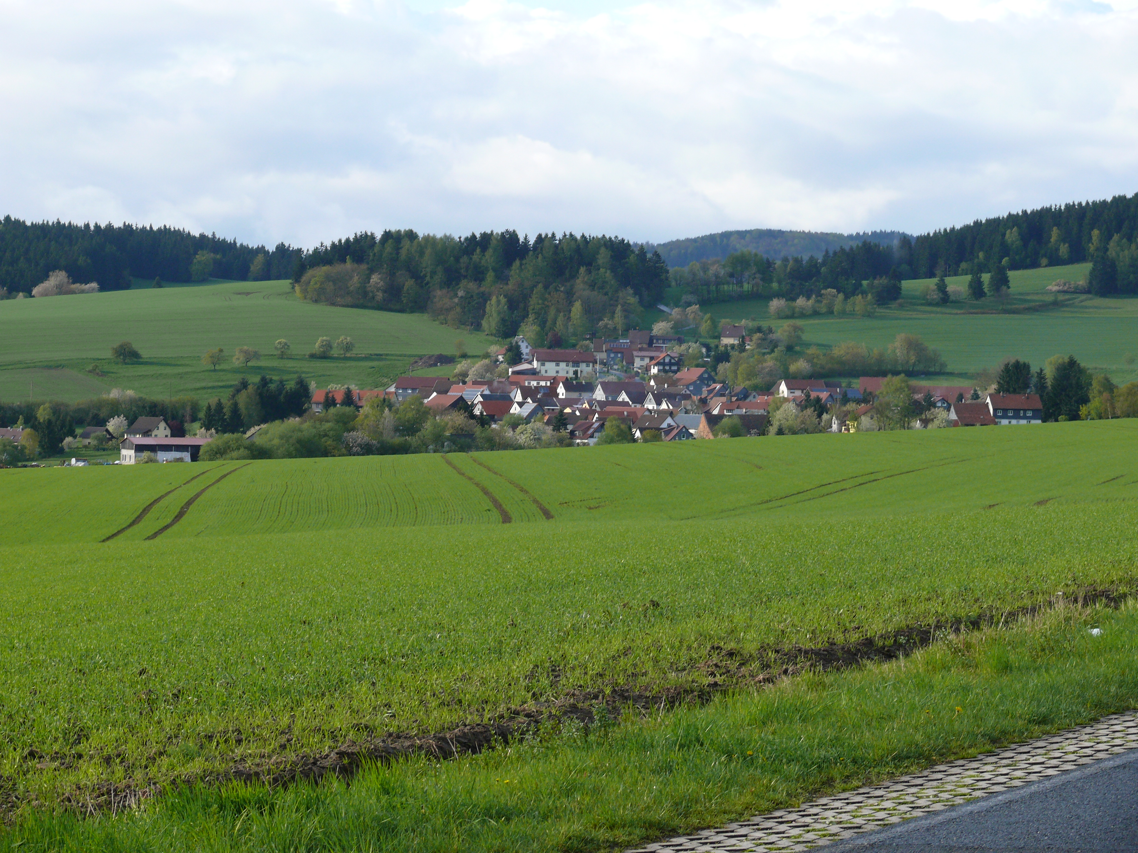 Blick auf Oberwind in der Gemeinde Auengrund in Thüringen.